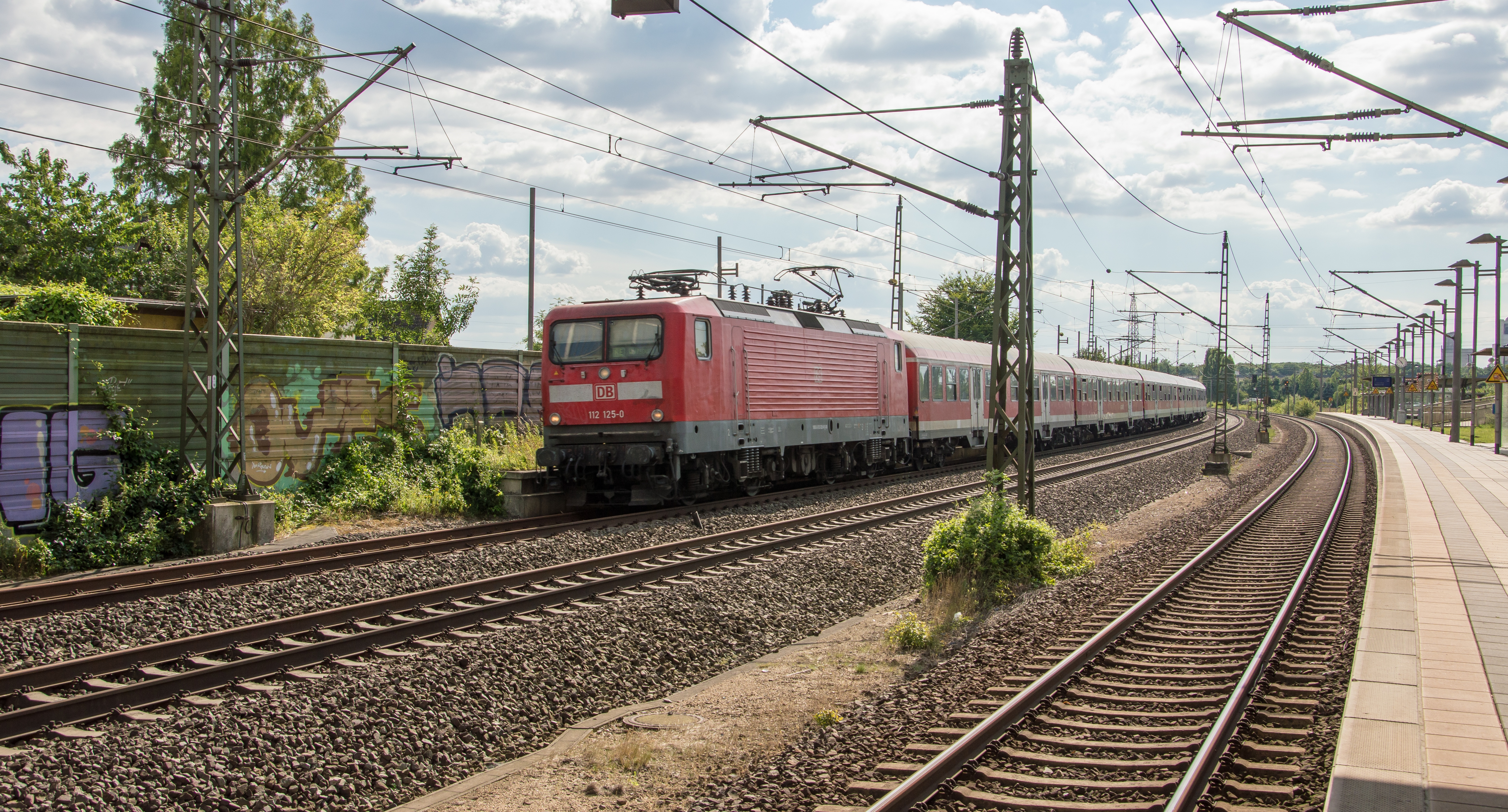 De RE Wolfsburg - Hannover gereden door DB 112 125-0, rijdt het station van Ahlten voorbij.